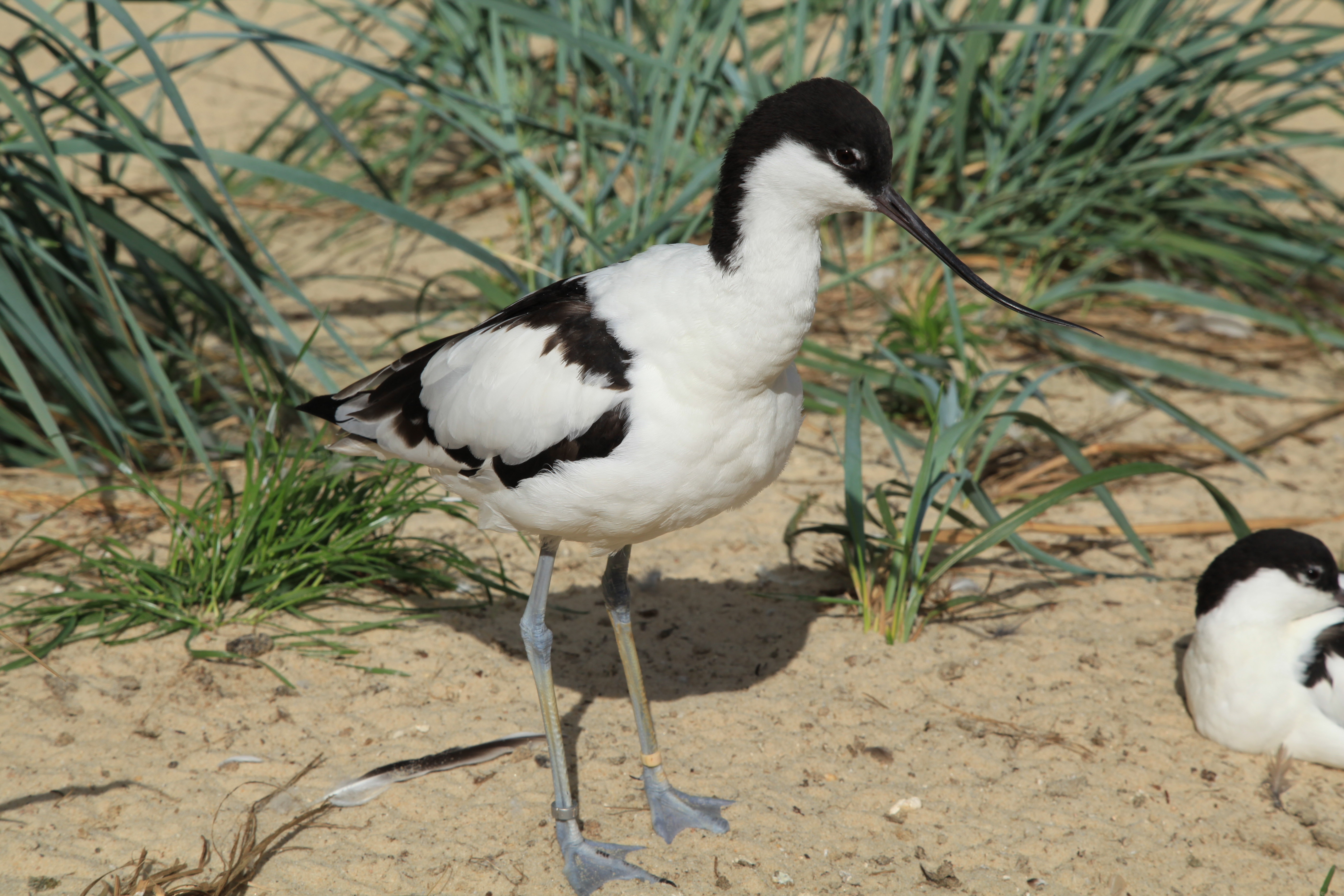 Recurvirostra avosetta im Tierpark an der Klinikstraße in Bochum